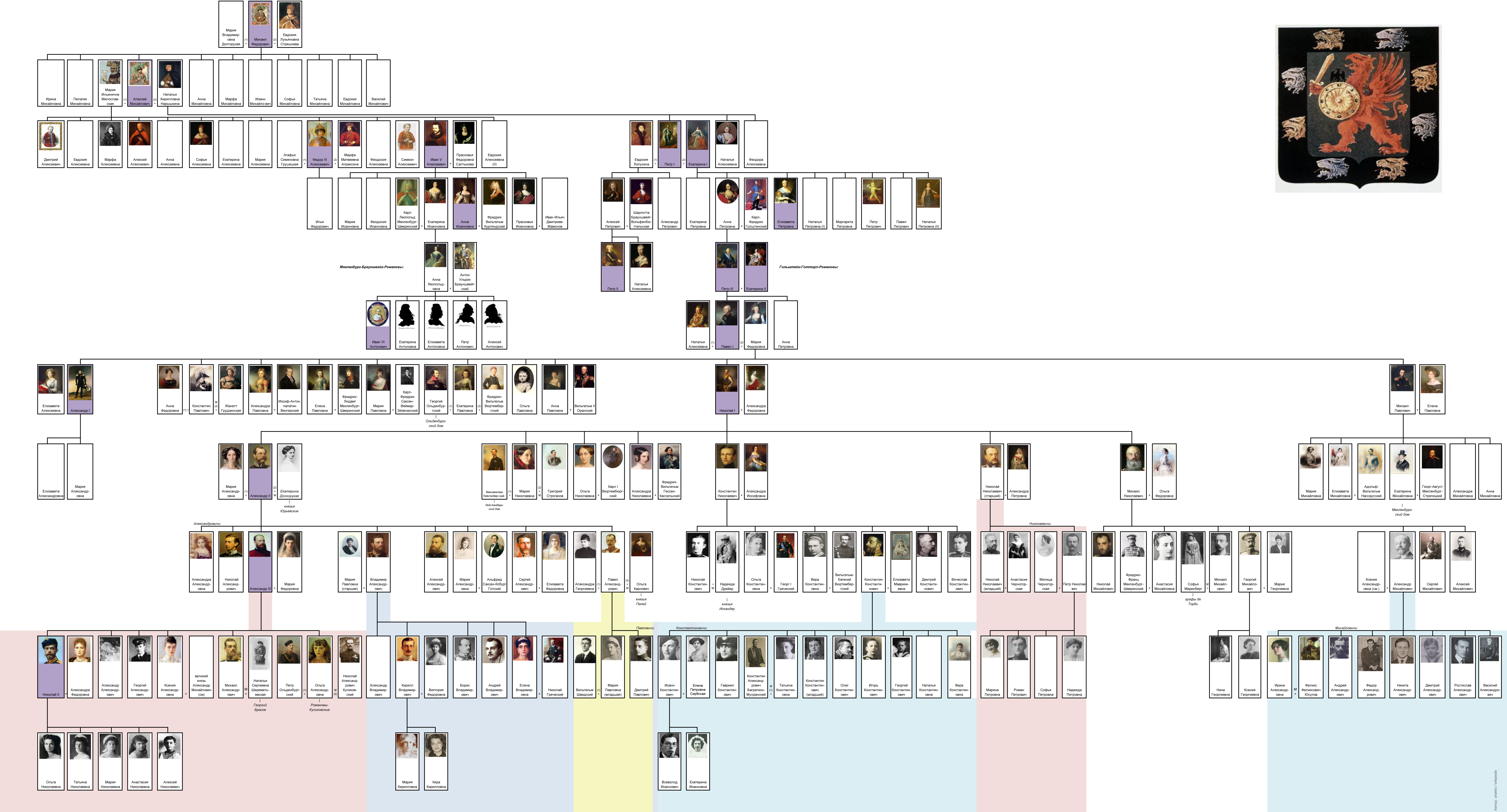 Генеалогическое древо дома Романовых (с 1613 до 1917 годы: с момента восшествия на престол до отречения Николая II)